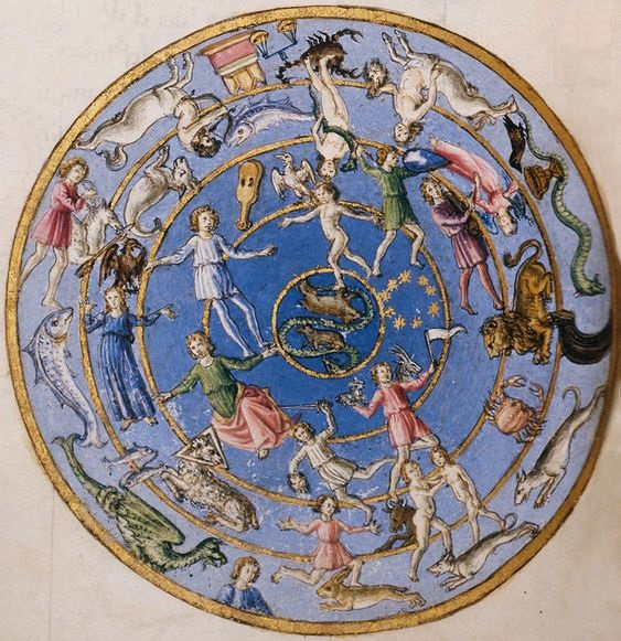 Miniatura di Francesco Botticini presente nel libro di Matteo Palmieri, Città di Vita, sec. XV, che raffigura le costellazioni del cielo boreale e i segni dello zodiaco.